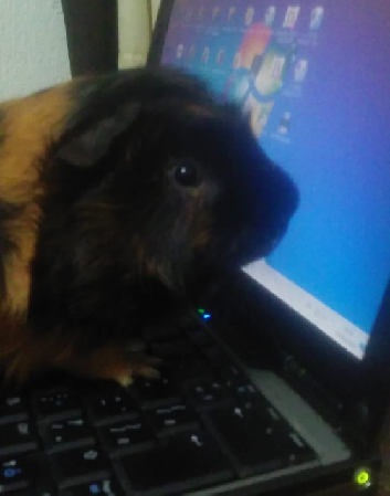 Porquinho-da-Índia em um notebook